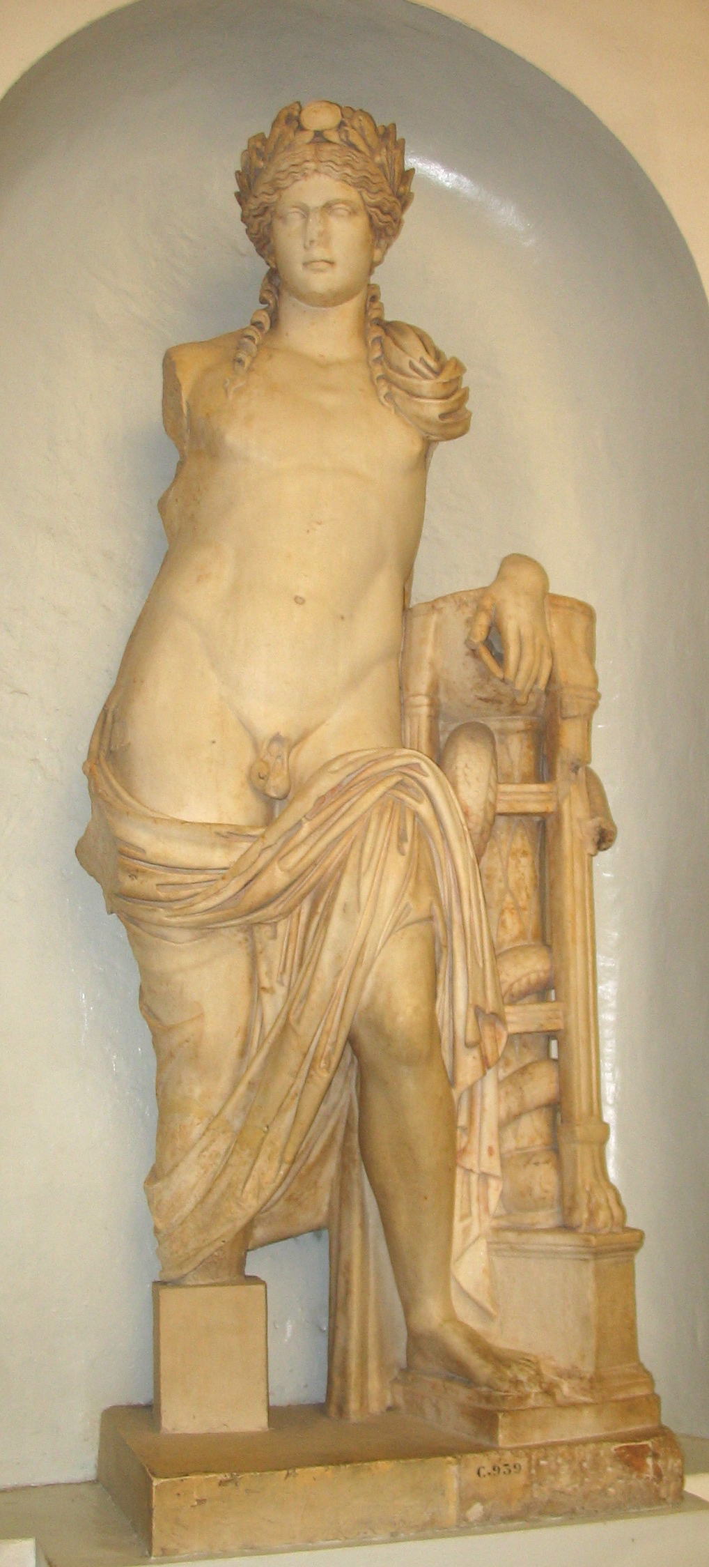 Apollo appoggiato al tripode delfico, scultura romana II sec., esposta all'ex Museo nazionale del Bardo, Tunisi.